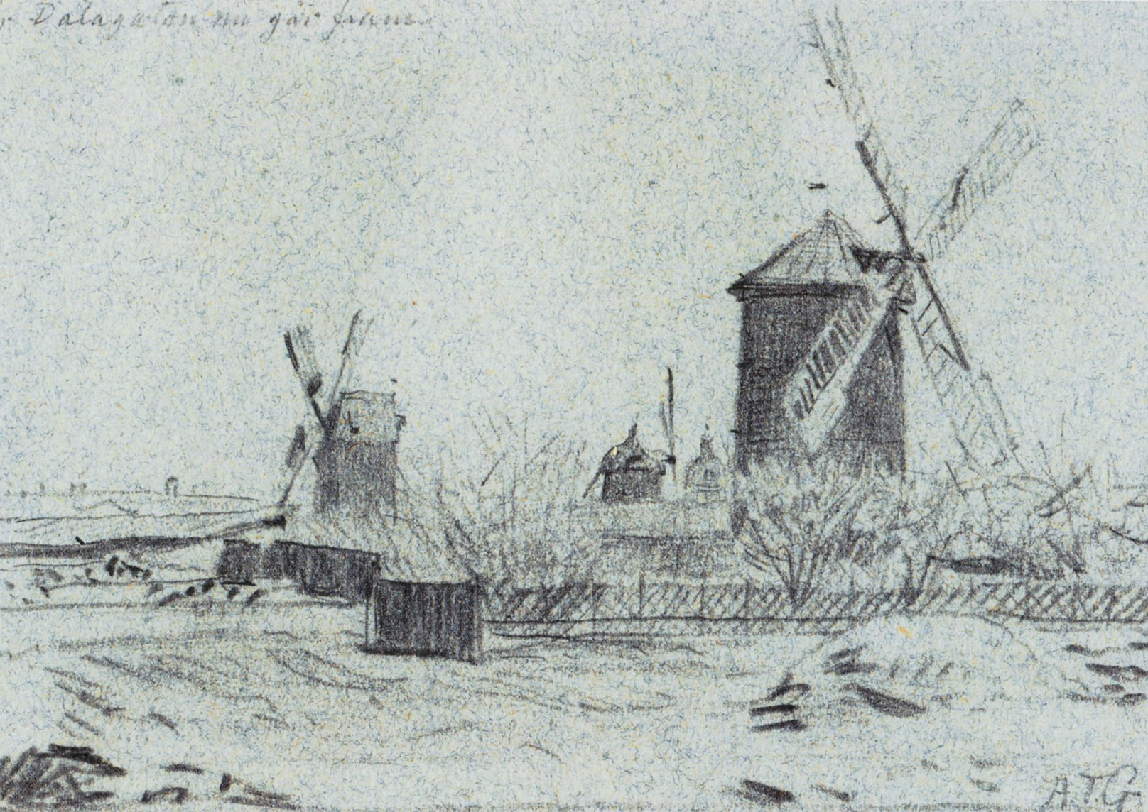 Gamla Rörstrandskvarnen även Lilla Tisan (t.v.) och Nya Rörstrandsgatan även Stora Tisan (t.h.) i bakgrunden syns Barnhuskvarnen